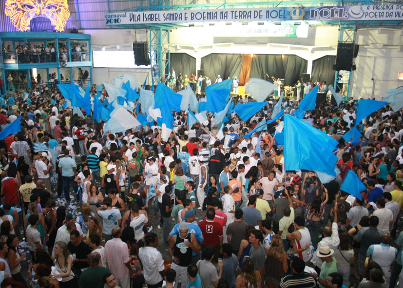 Fotógrafo Henrique Matos